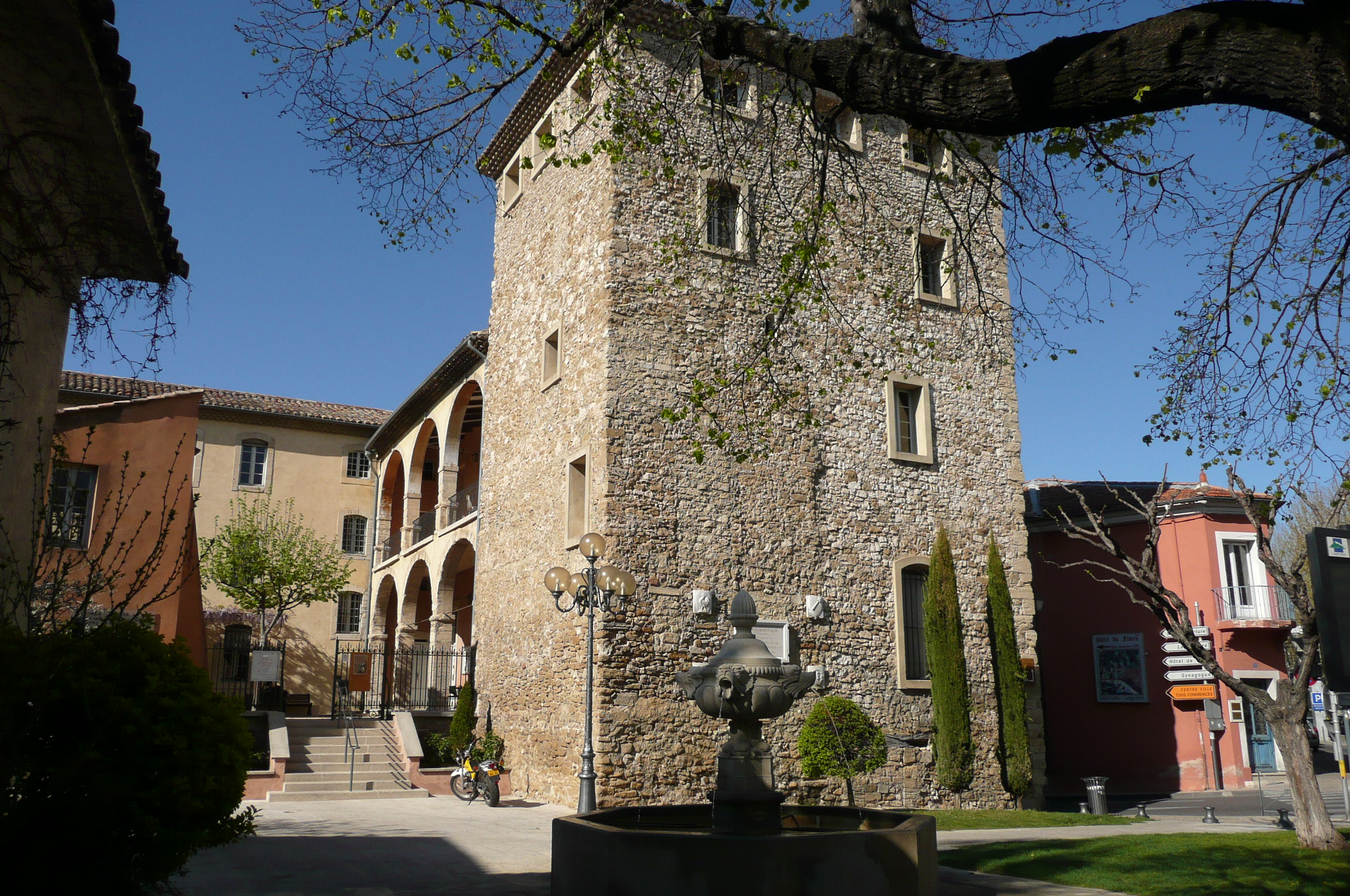 Fontaine à Carpentras